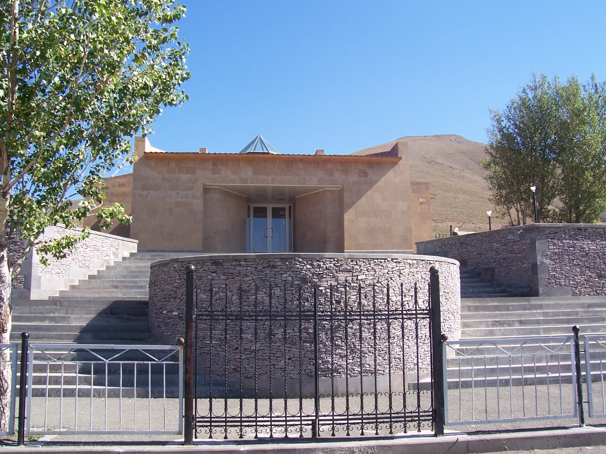 no original description 94/8